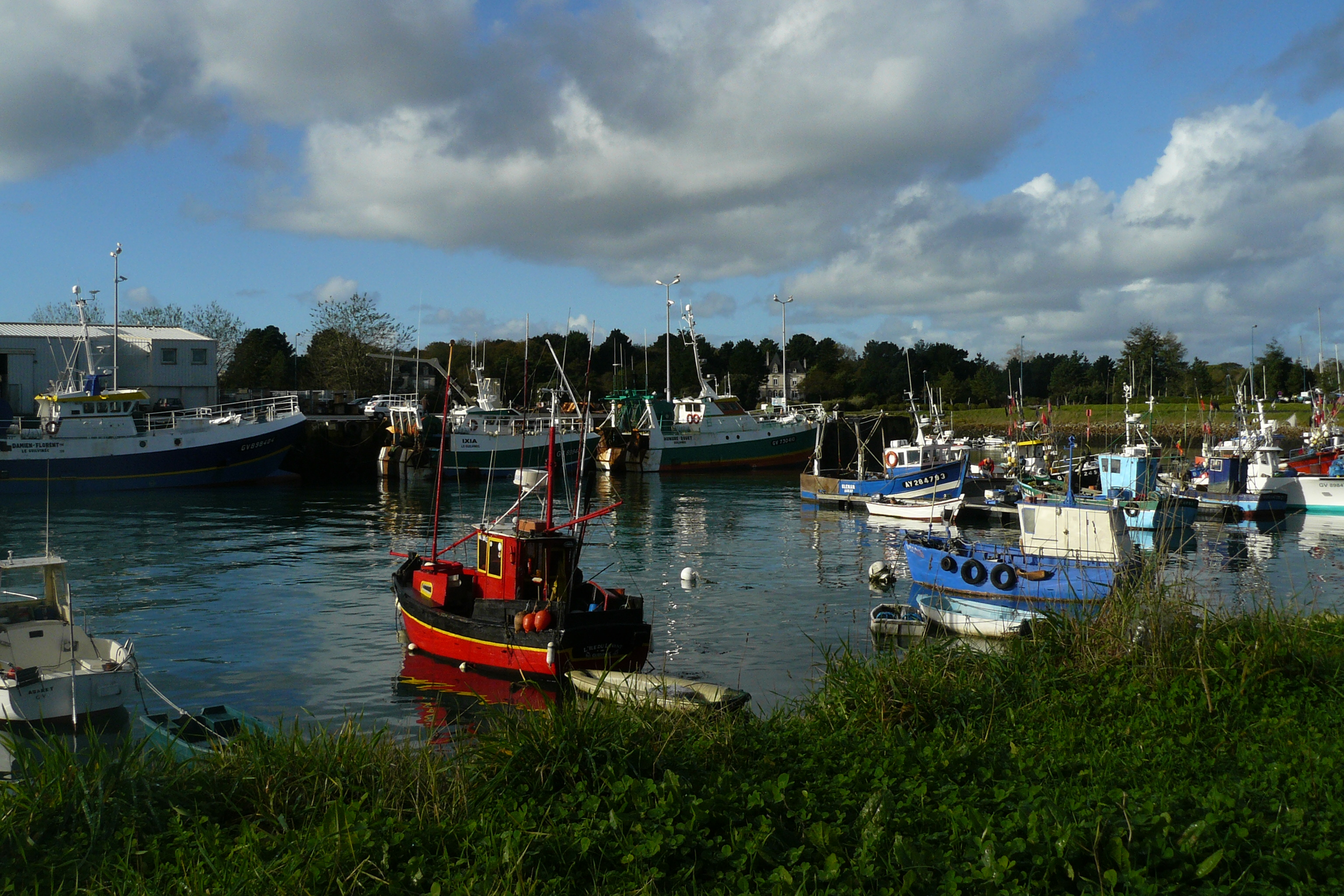 Canots et chalutiers hauturiers dans le port de pêche de Loctudy.